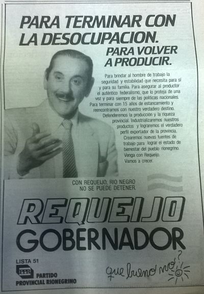 Afiche de campaña de Roberto Requeijo, candidato a gobernador, en 1987.